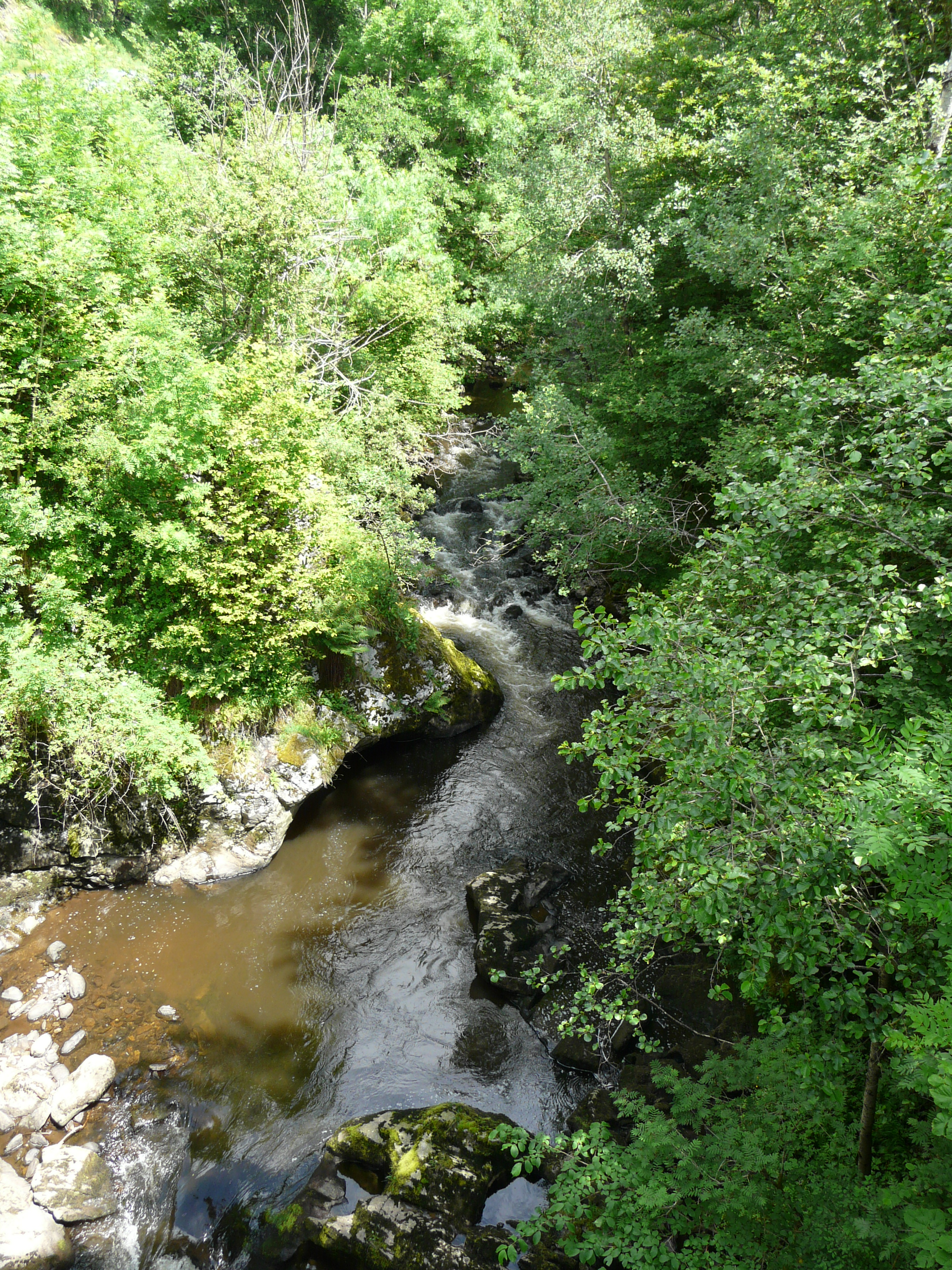 La Rhue en amont de la route départementale 678 à Chanterelle, Cantal, France.